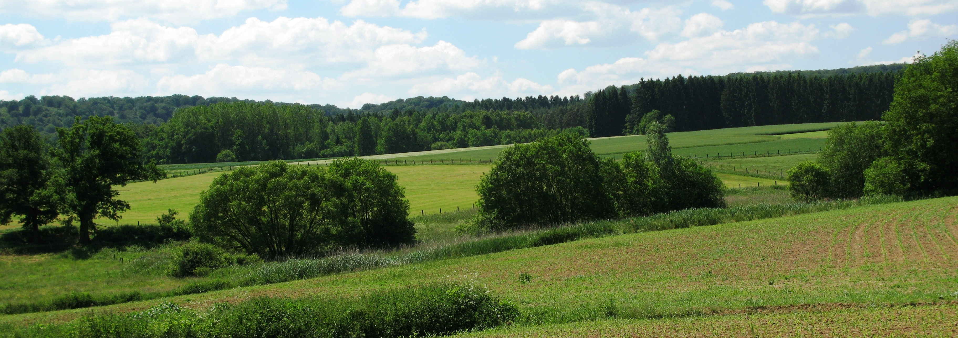 Den Dall vun der Péilz op der belsch-lëtzebuergescher Grenz.